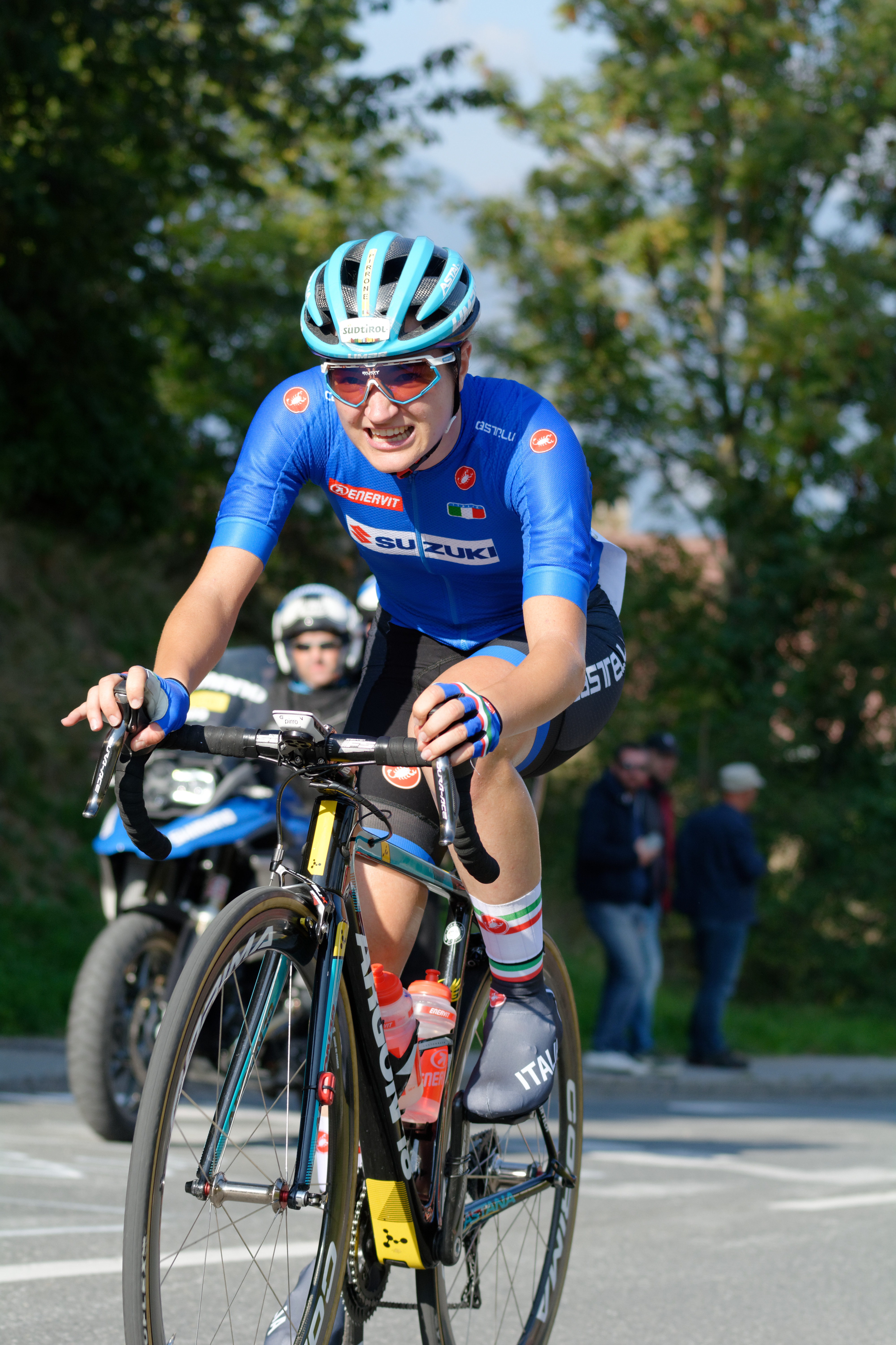 D71_5986_DxO